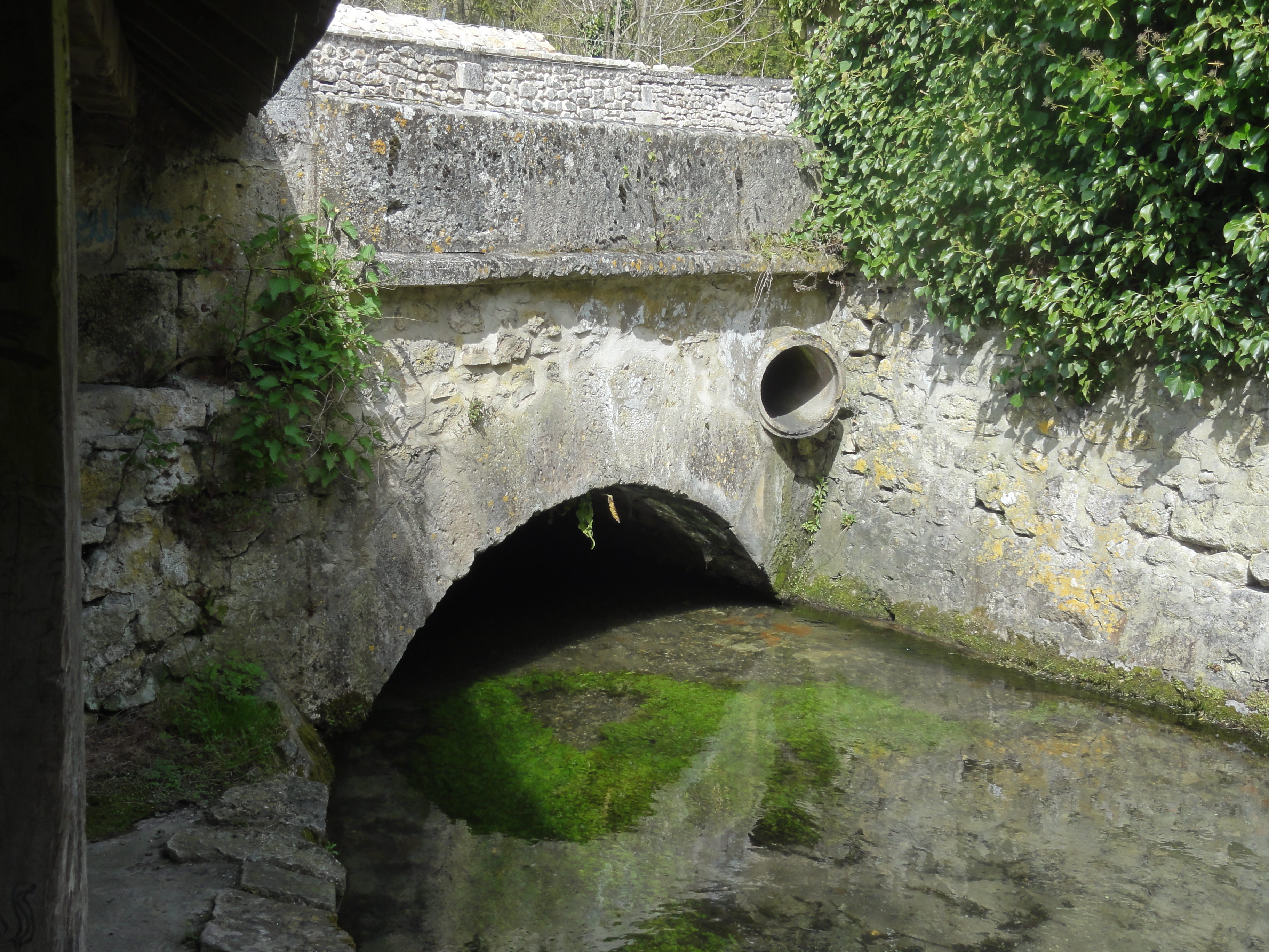 Pont sur la Sainte-Marie à Duvy.